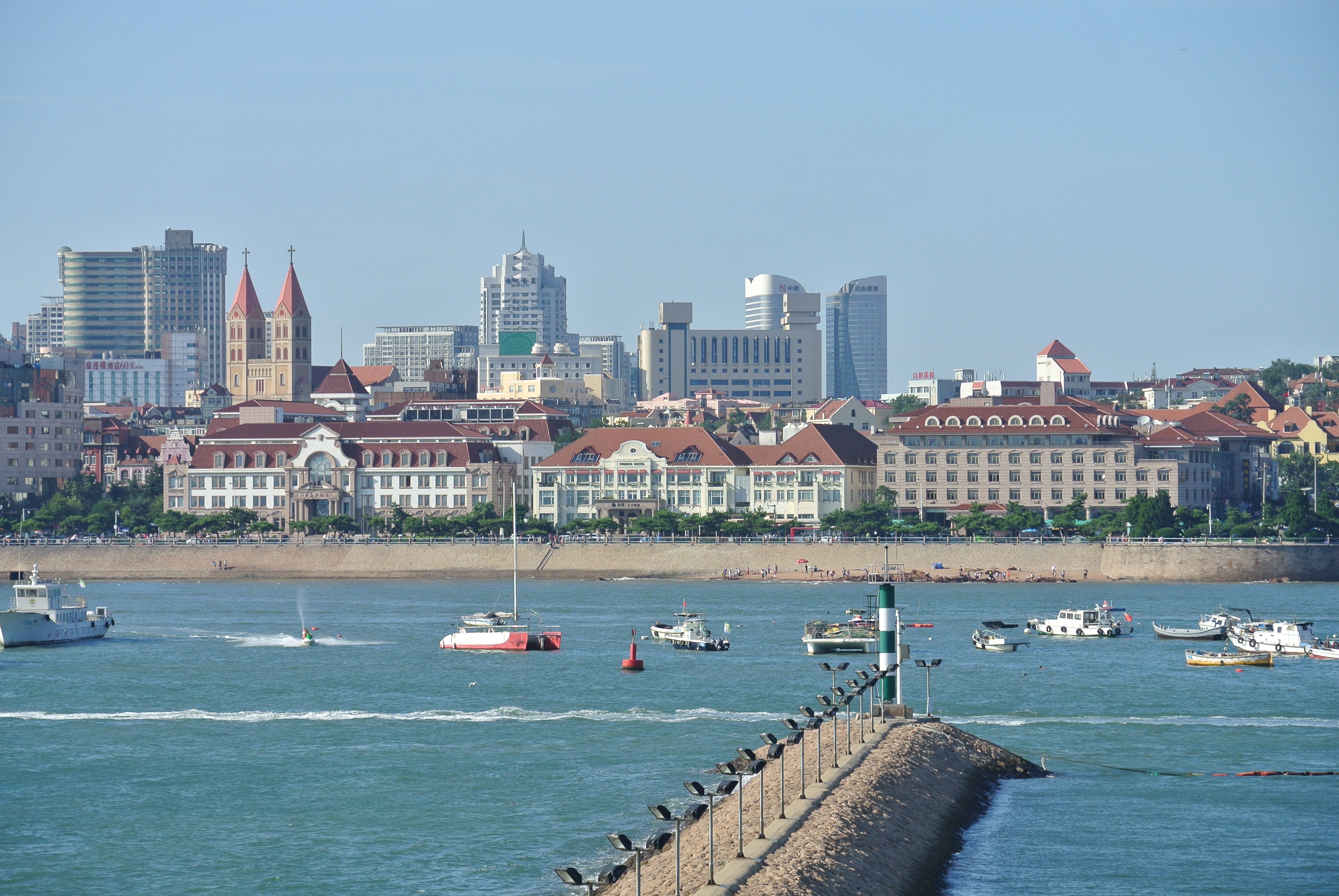 青岛海因里希亲王饭店旅馆部旧址远眺